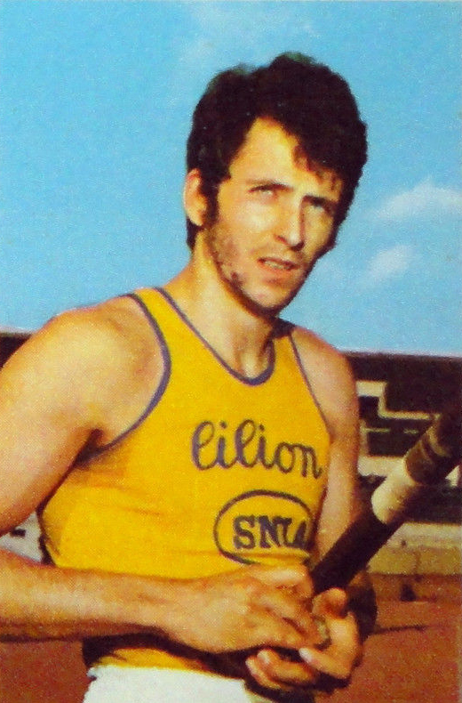 CAMPIONI DELLO SPORT 1970/71-n.16-RIGHI-ATLETICA LEGGERA